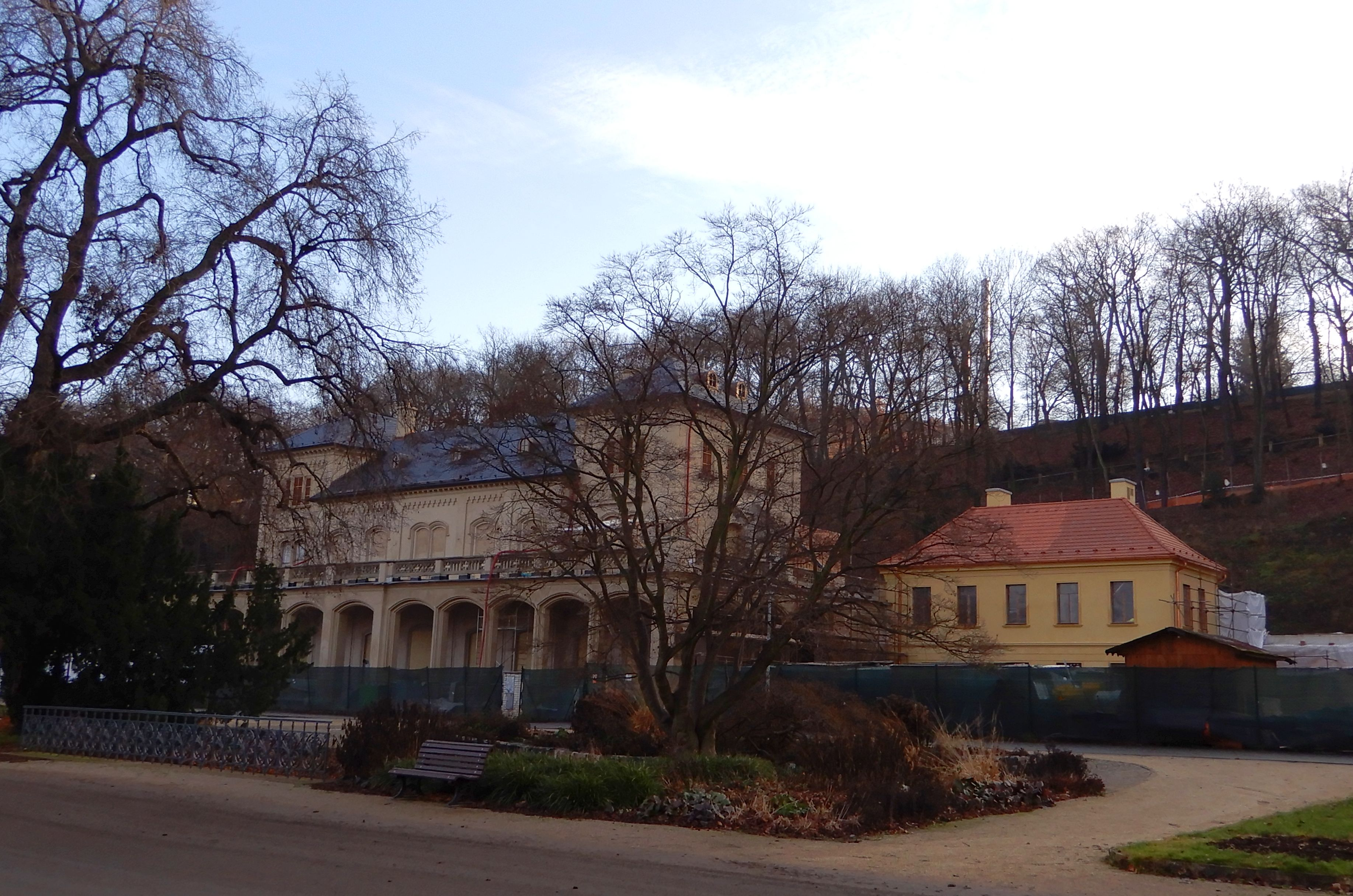 Šlechtova restaurace, Královská obora -stav- 12-2019